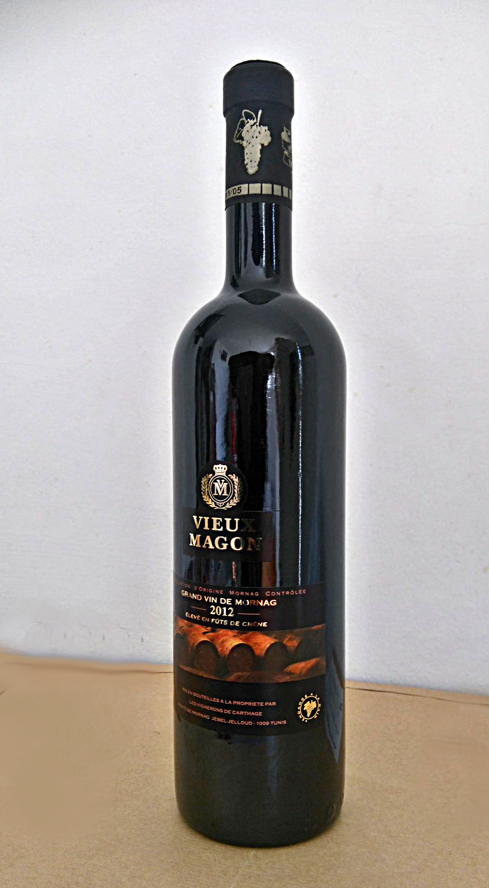 Bouteille de vin rouge, vieux Magon de Tunisie